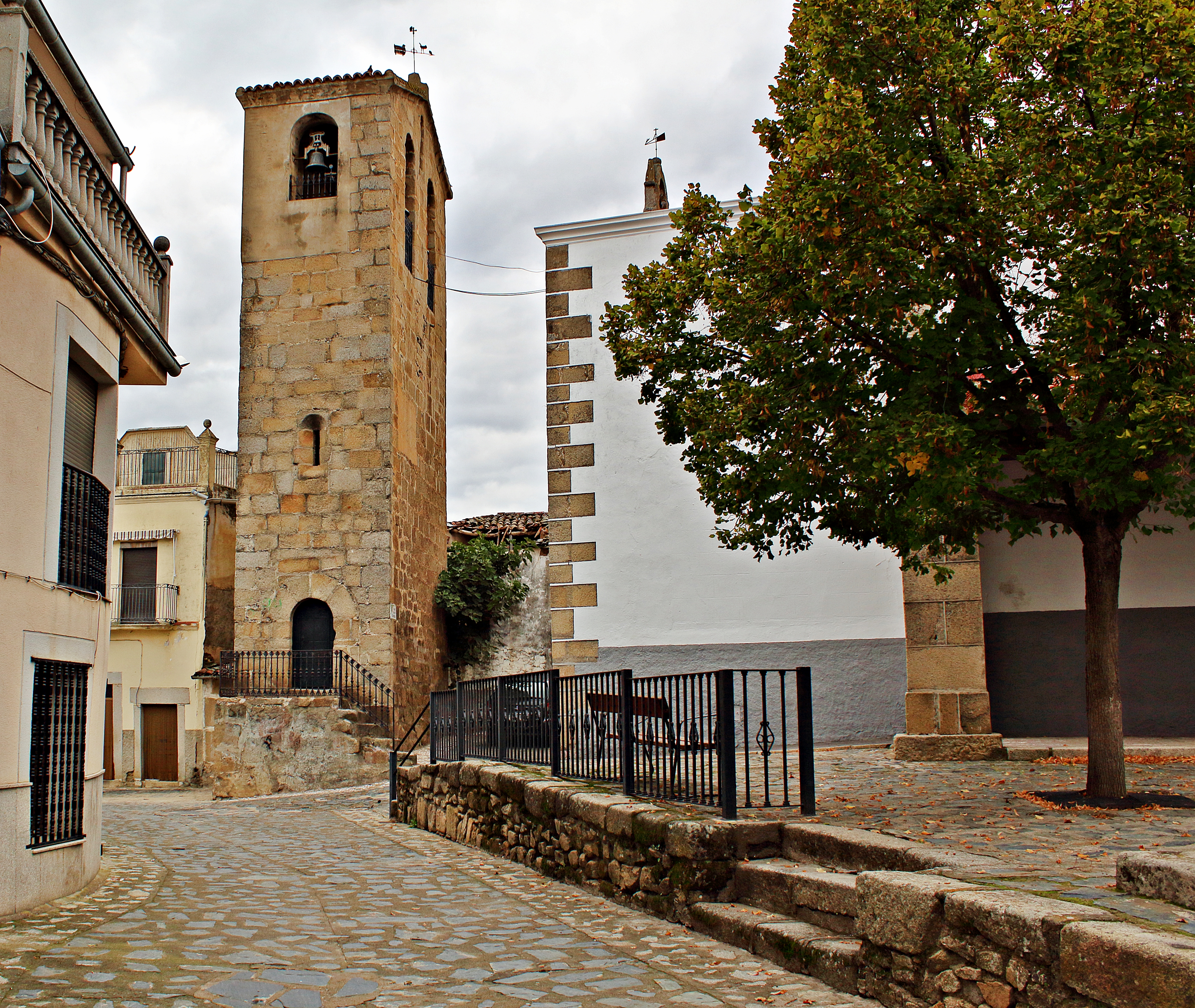 Ahigal, municipio de la comarca de Trasierra-Tierra de Granadilla, provincia de Cáceres